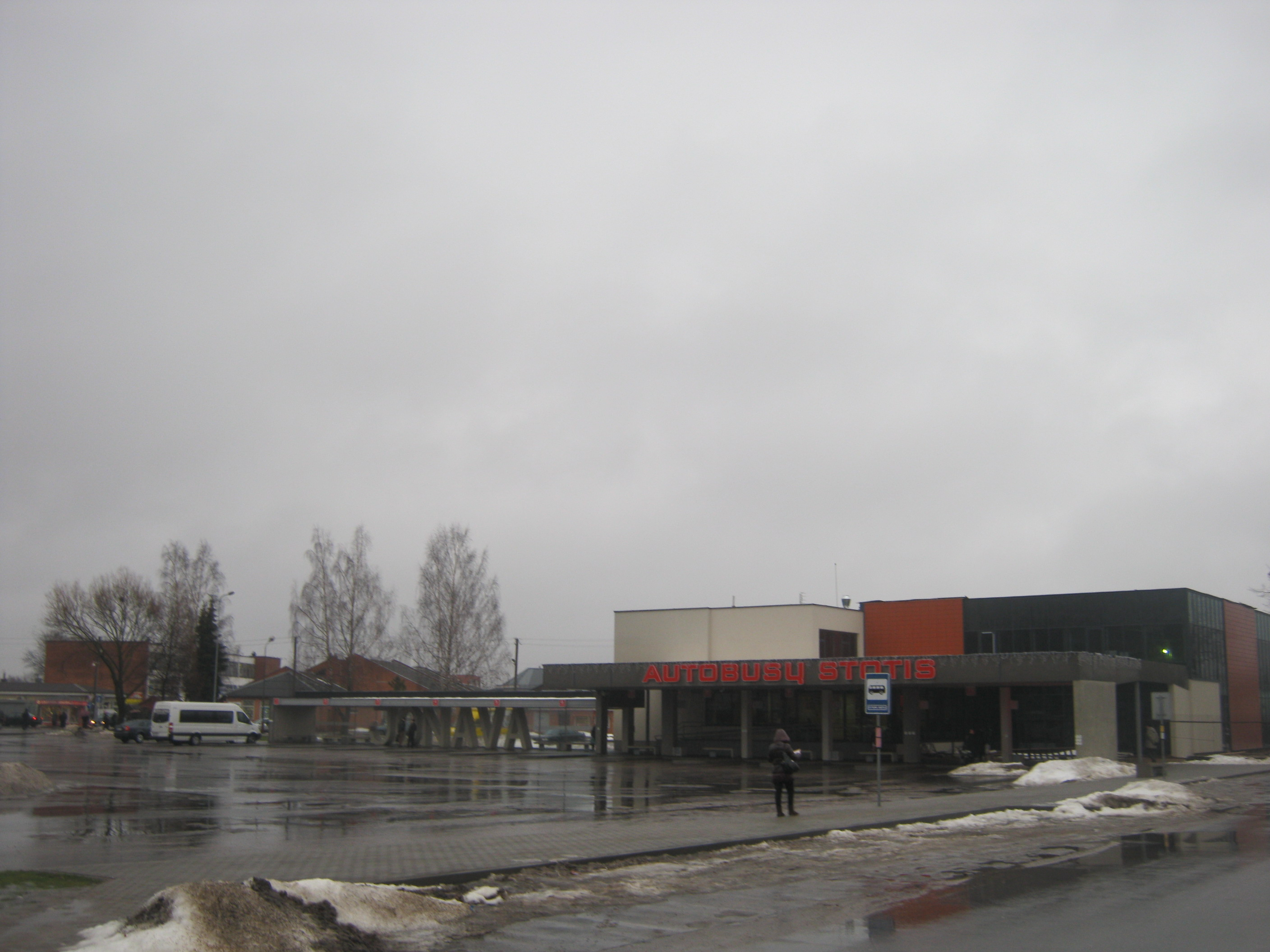 Jonavos autobusų stotis